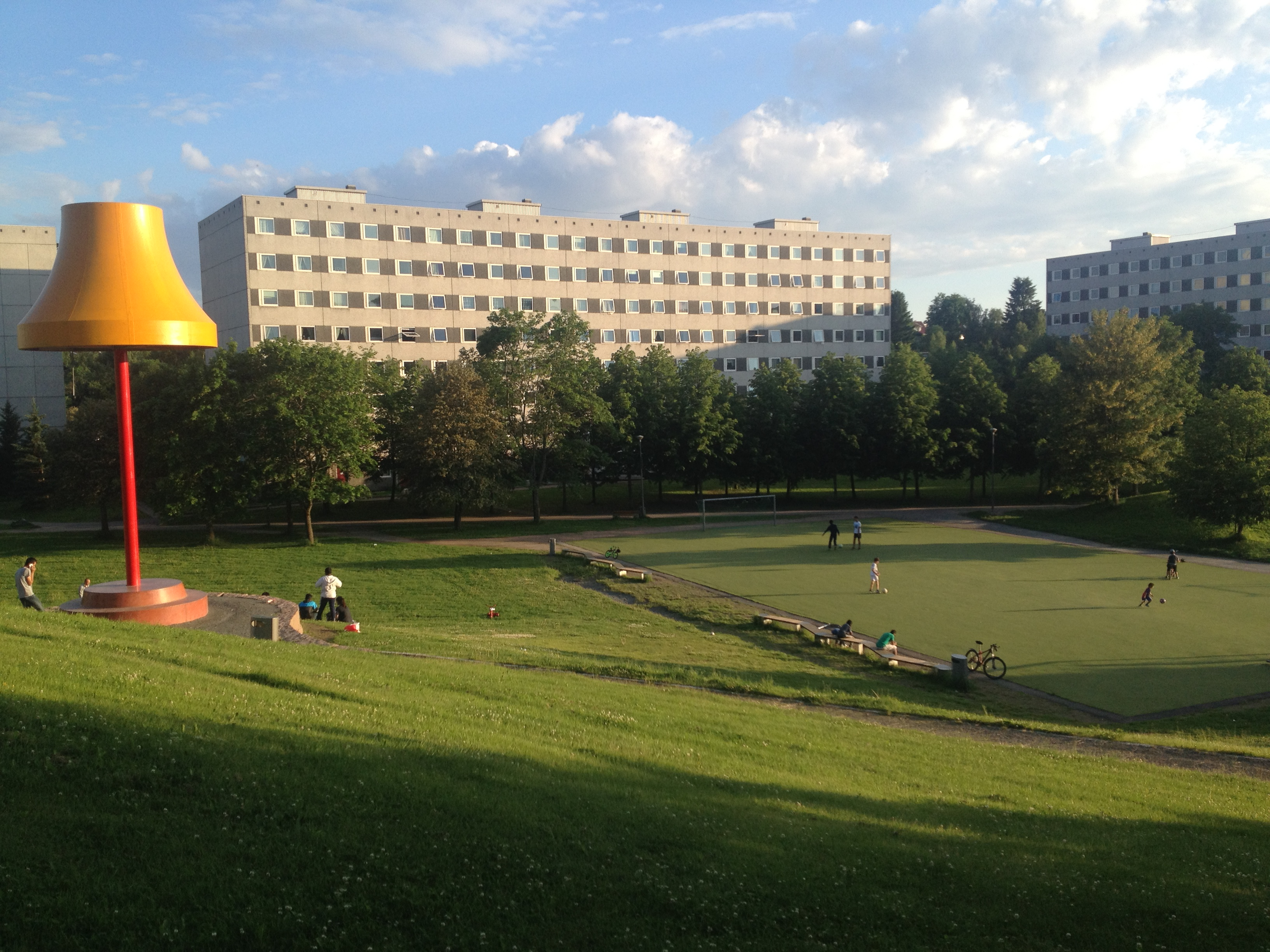 Haugenstua i Oslo